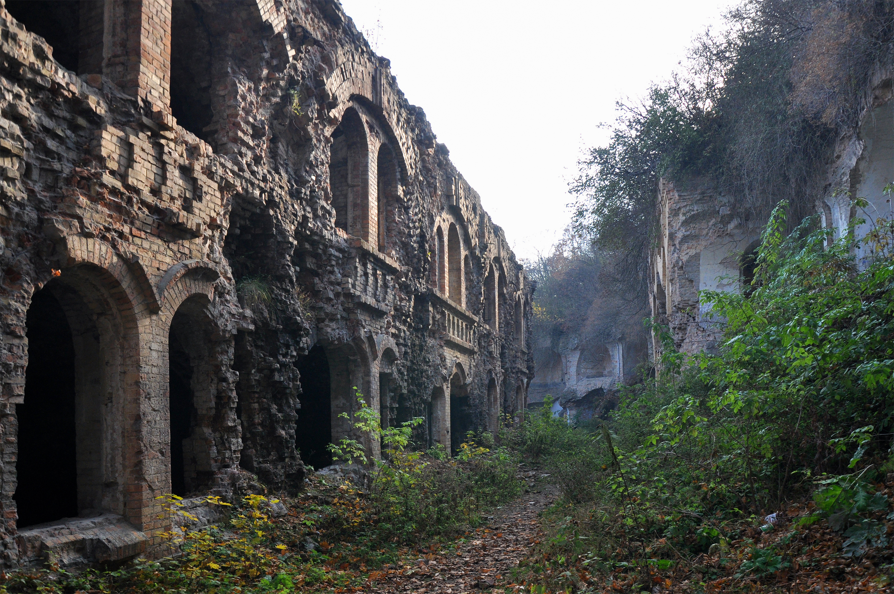 Дубенський форт (мур.), с. Тараканів, неподалік від села